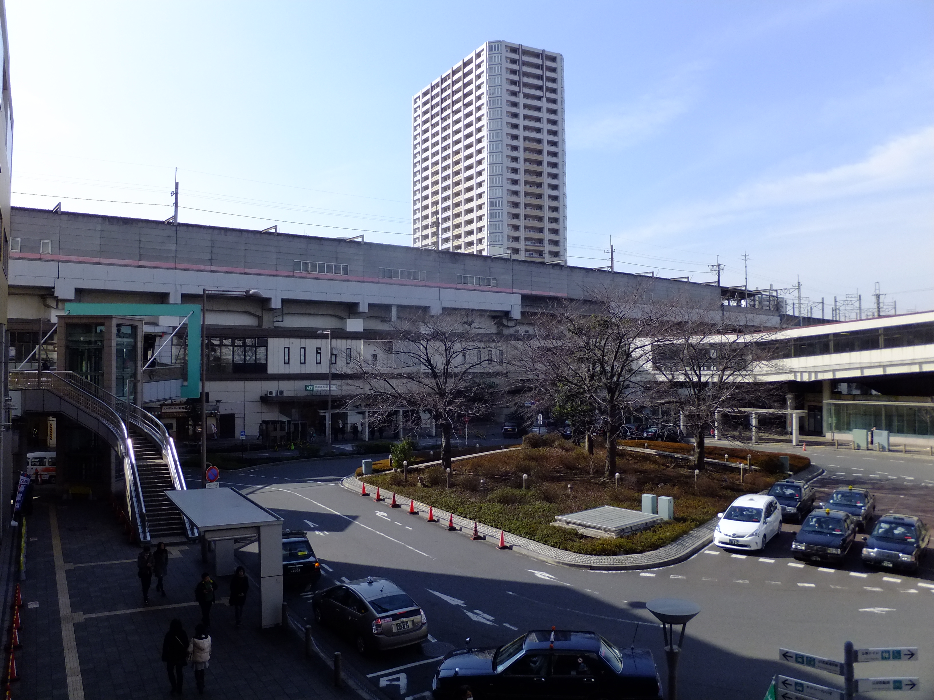 埼京線・武蔵野線・武蔵浦和駅東口ロータリー